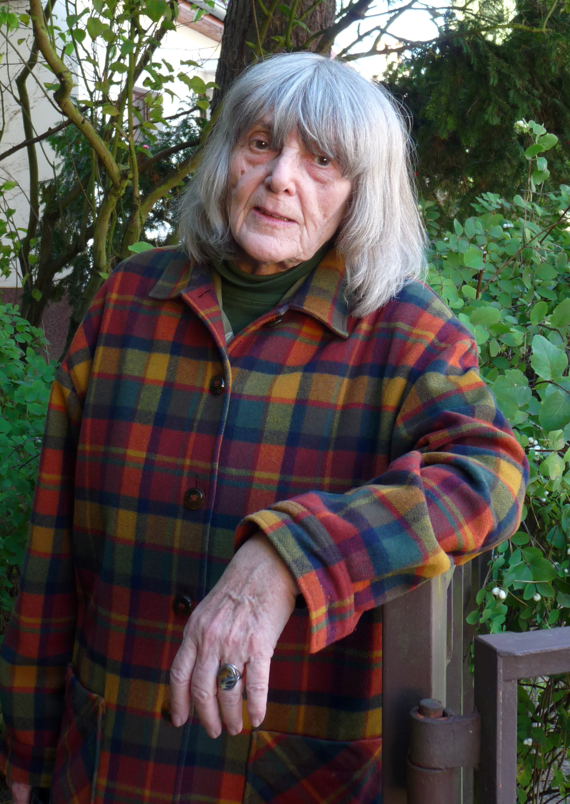 Porträtaufnahme von 2012